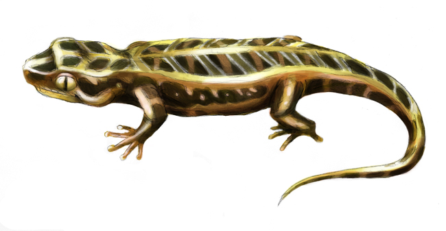 Tukutuku rakiurae